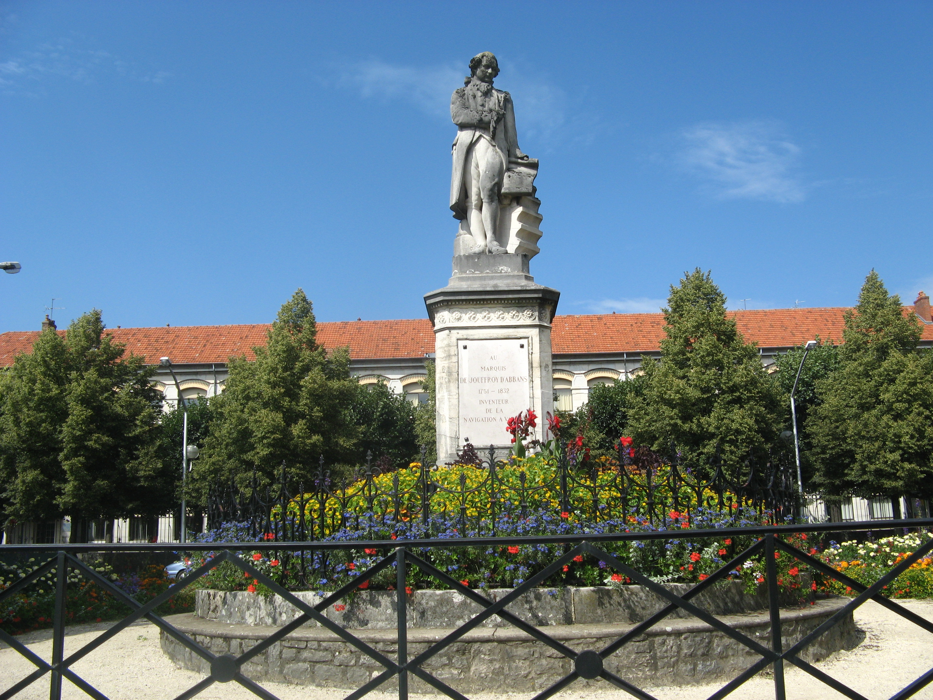 Statue du marquis claude jouffroy d'abbans